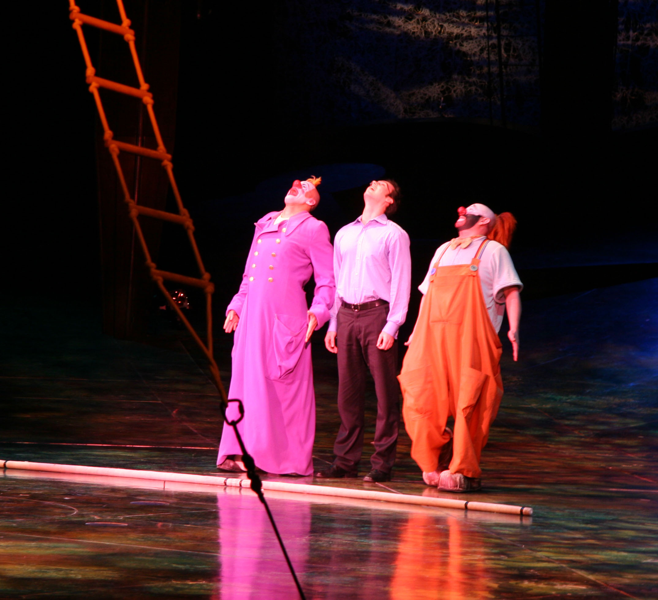 Cirque du Soleil, Alegria, at Royal Albert Hall, London, UK.